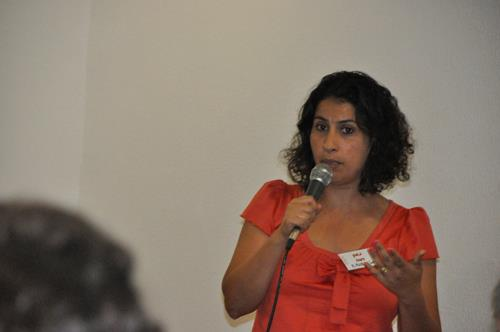 אסמא אגבארייה זחאלקה